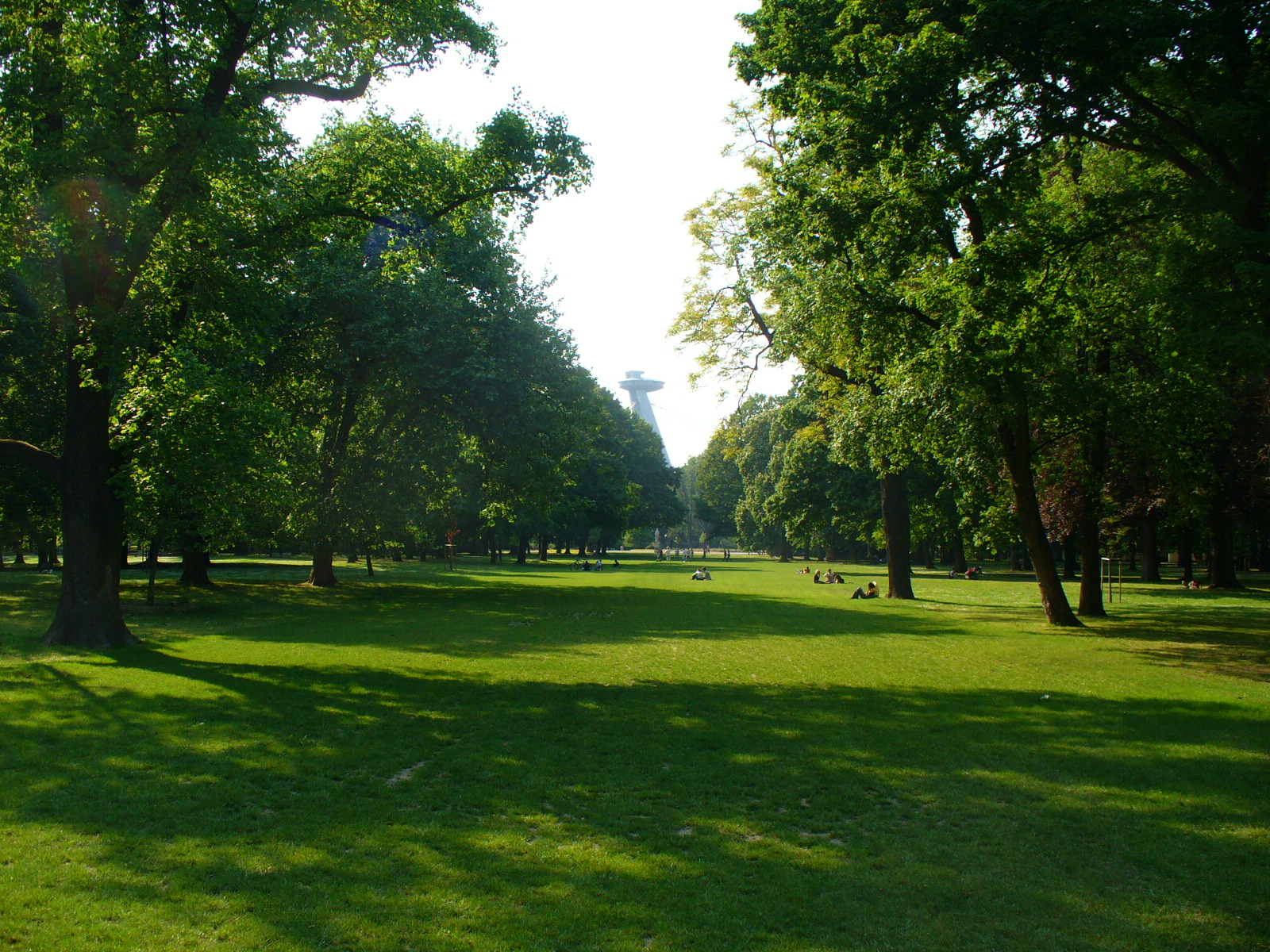 Sad Janka Kráľa, Bratislava, Slovakia